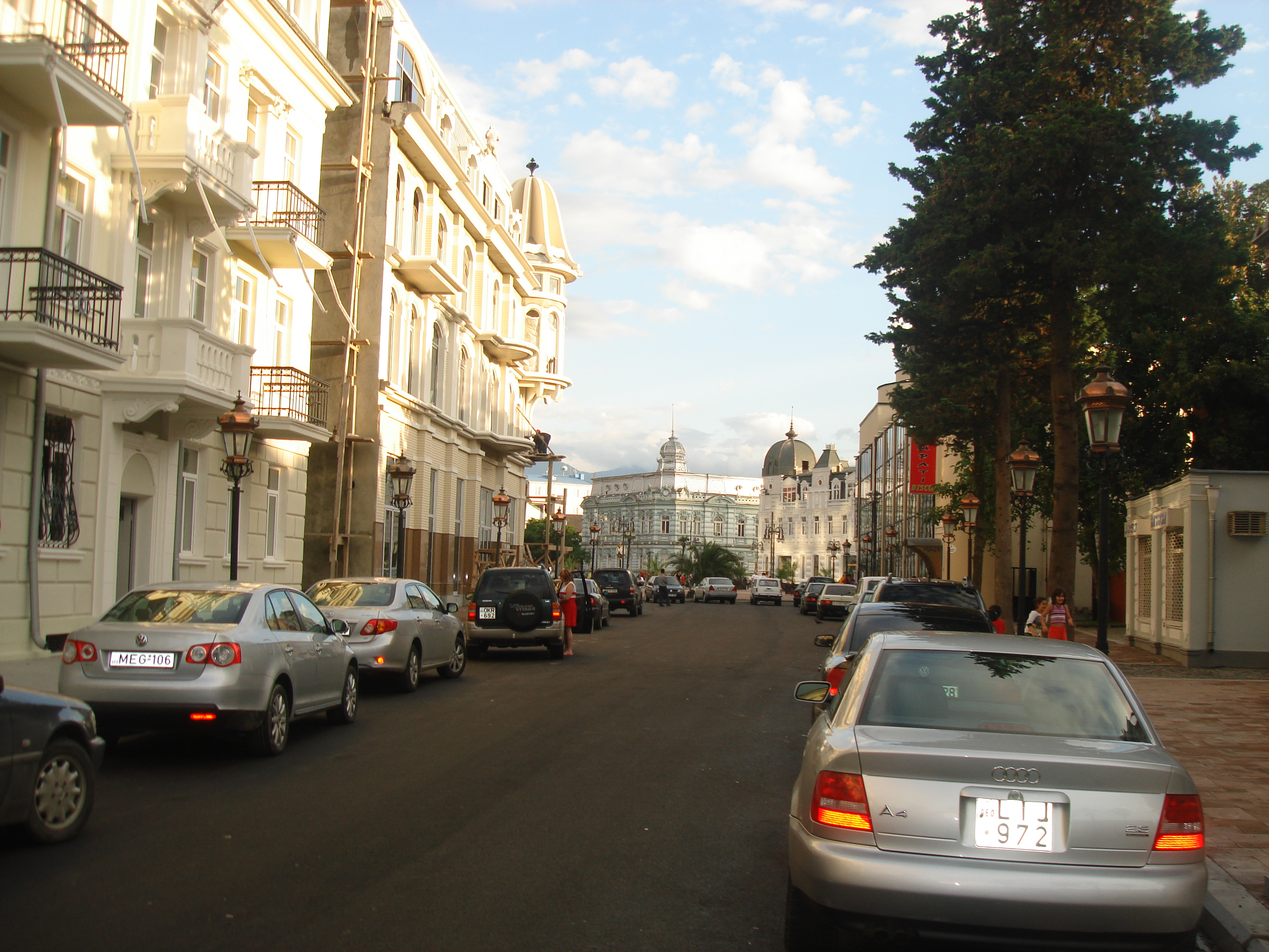 Street scene, Batumi 2009